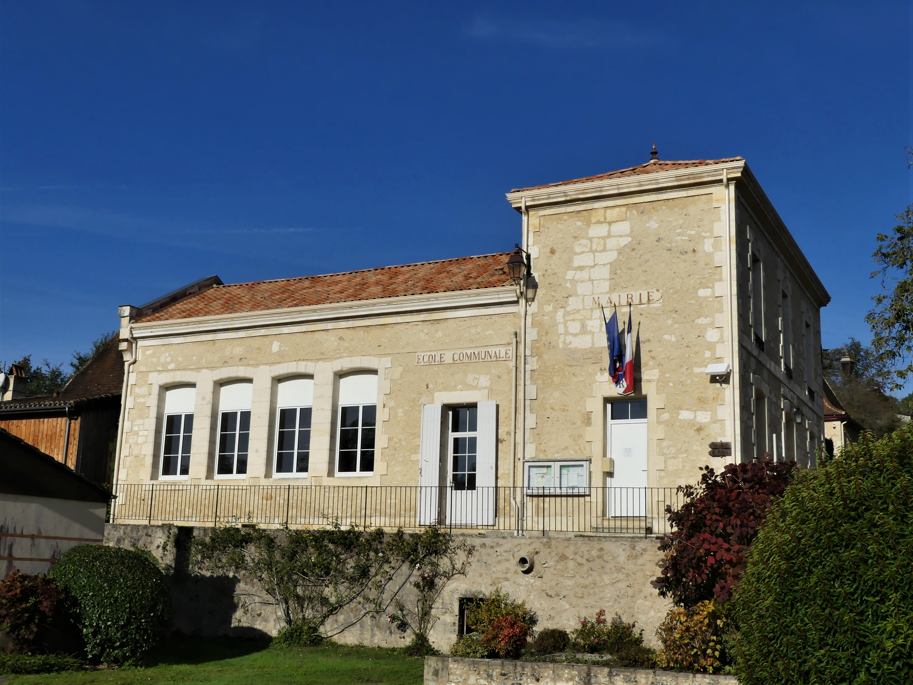 La mairie et l'ancienne école de Laveyssière, Dordogne, France.